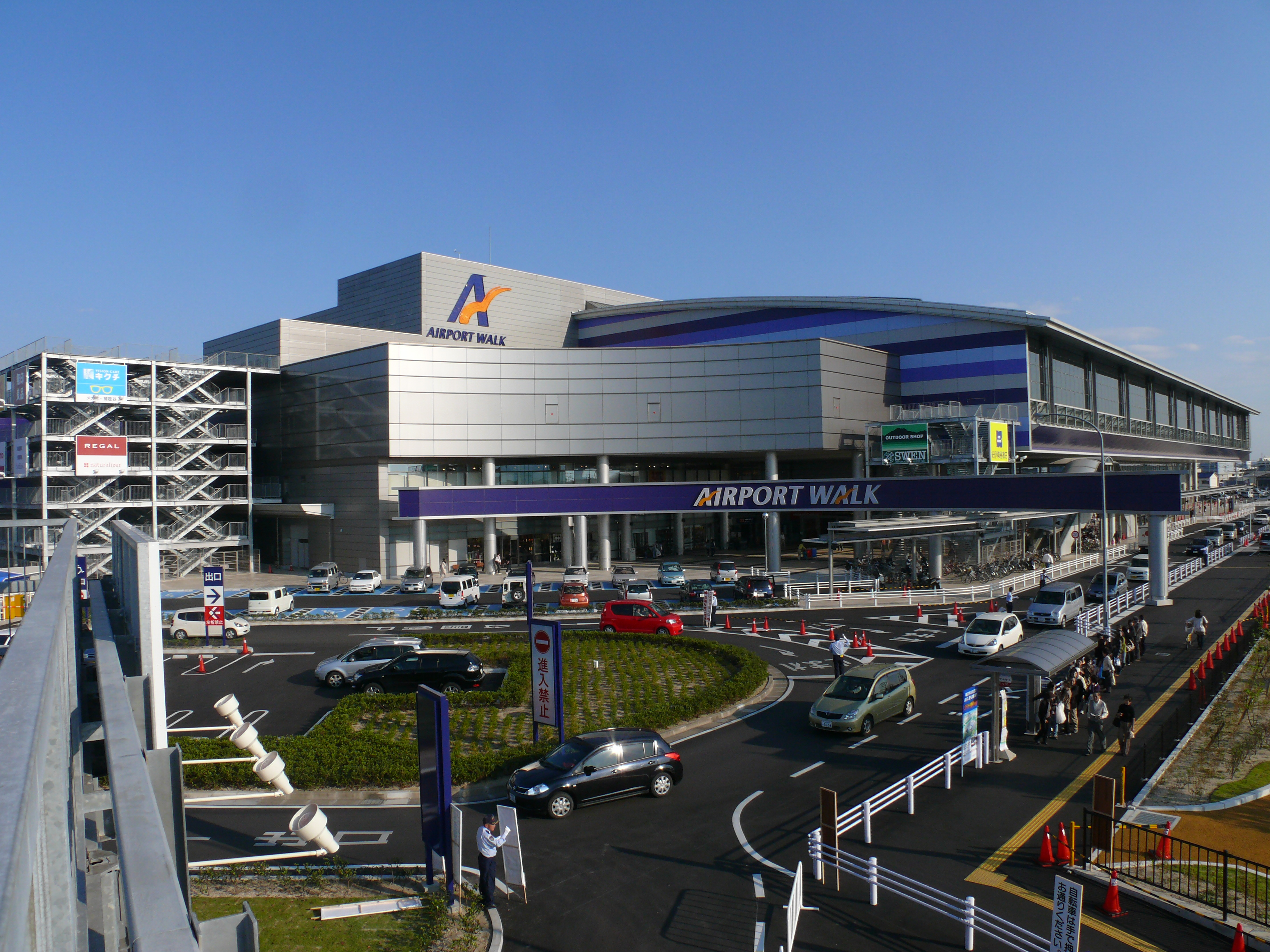 愛知県西春日井郡豊山町にあるエアポートウォーク名古屋